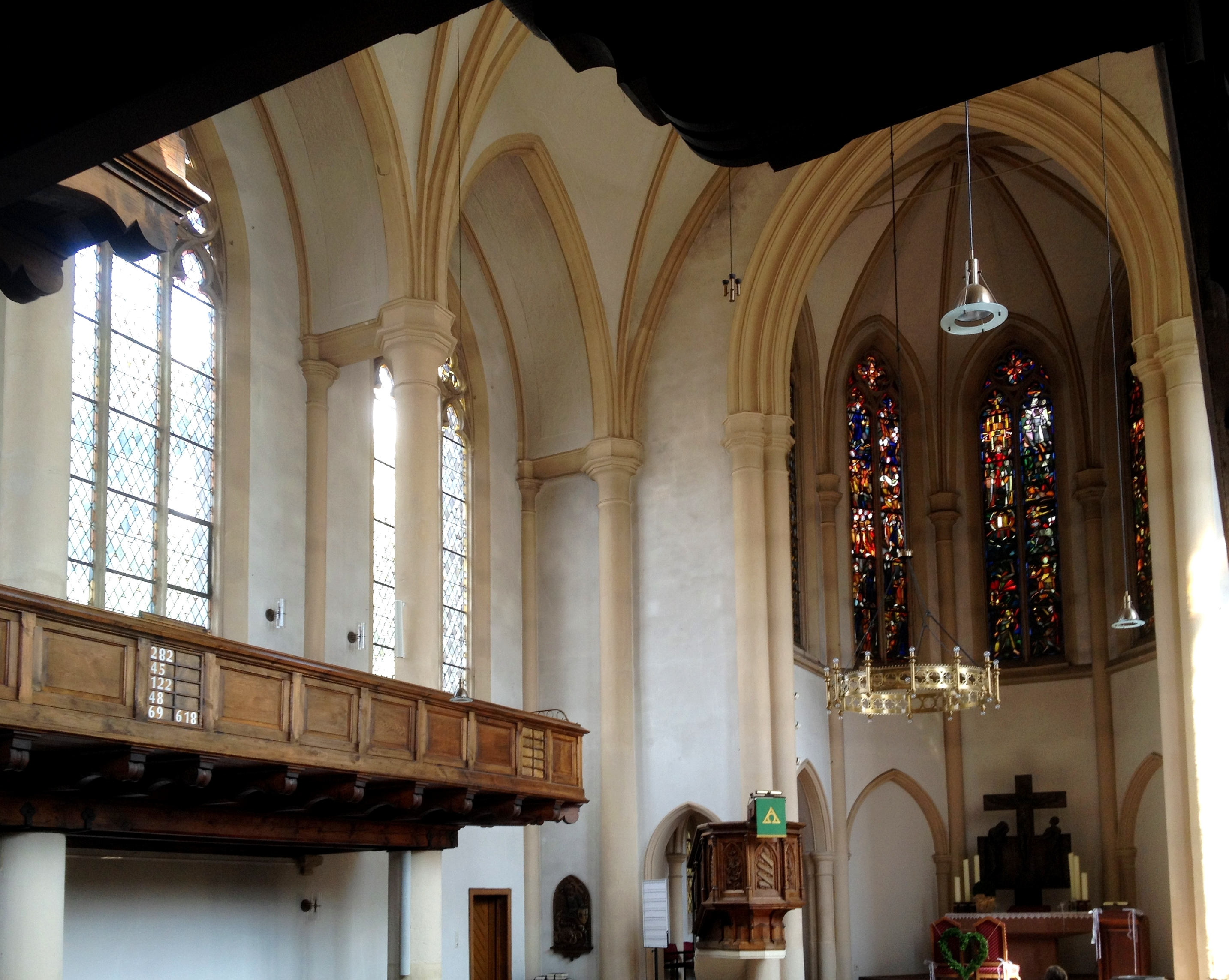 Bad Pyrmont, ev.-luth. Christuskirche